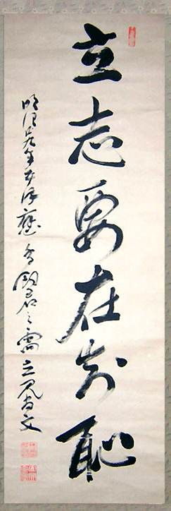 当家が所蔵する掛け軸で、1896年に立見尚文氏が祖父鳥飼正一に求められて描いた書である